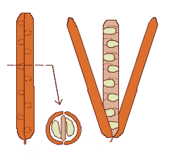 Morfología del fruto, silicua, aspecto general del fruto cerrado y abierto y sección transversal. Según Simpson (2005) Plant Systematics.